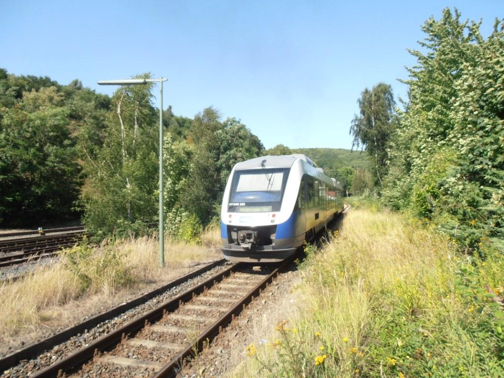 Lammetalbahn, Zugausfahrt aus dem Bahnhof Bad Salzdetfurth